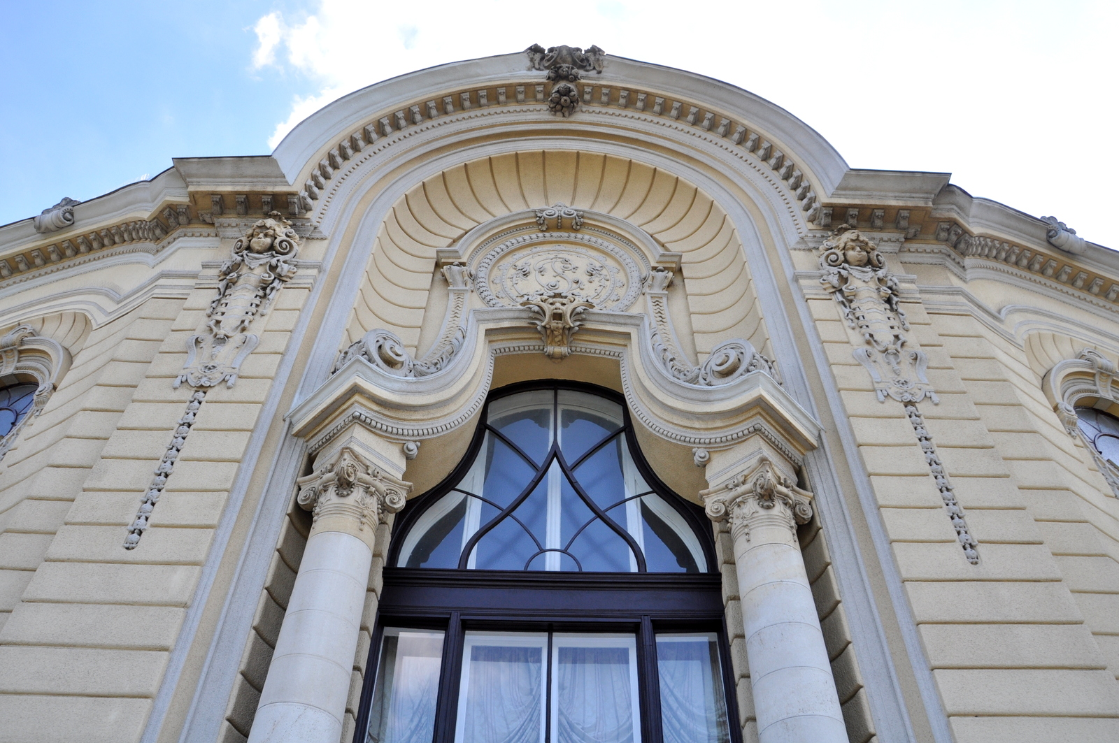 Stefánia Palace